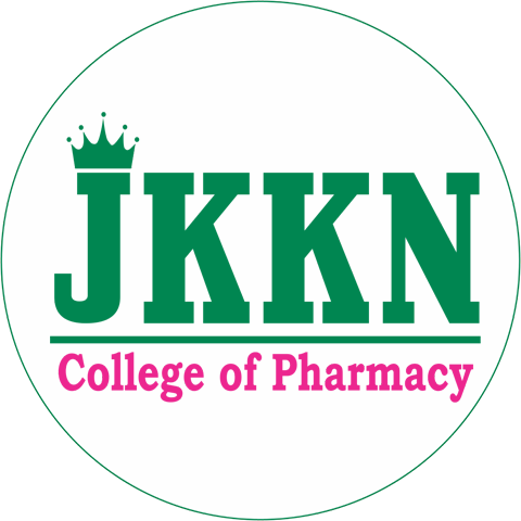 ஜே.கே.கே.நடராஜா மருந்தக கல்லூரி